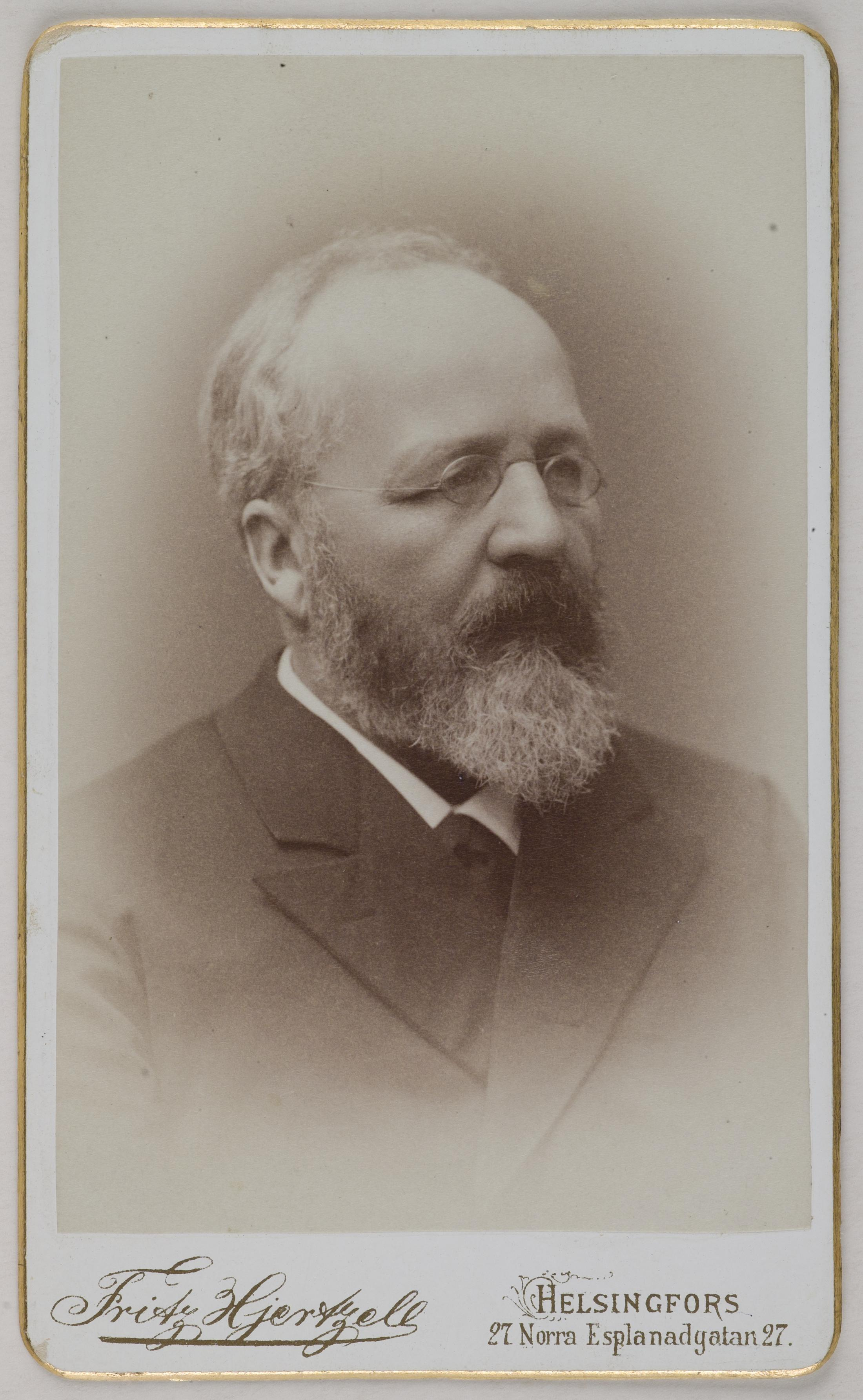 Kaarlo (Karl) Slöör, Mary Gallen-Kallelan isä, Helsingissä otetussa muotokuvassa. kuvauspaikka: Helsinki ajoitus: kuvaaja: Fritz Hjertzell, Fotograf kuva-alan mitat: 89x56mm tekniikka: merkintöjä: inventointinumero: Kot. 2/100 kokoelma: Akseli Gallen-Kallelan valokuvakokoelma tutki lisää / explore further: Tiedätkö lisää tästä kuvasta? Kerro meille! Do you have information on this photo? Let us know!